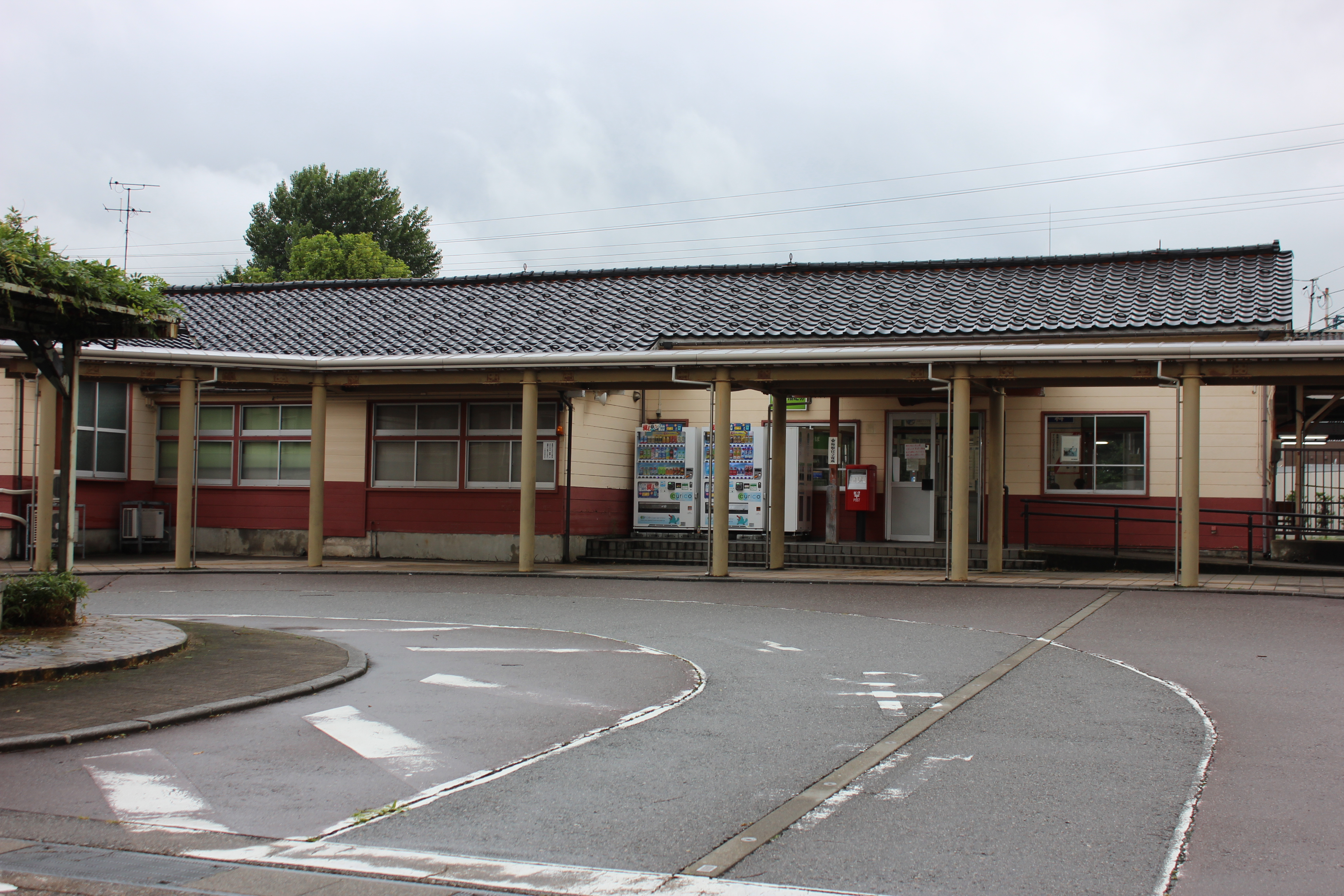 速星駅（富山県富山市） Canon EOS Kiss X5